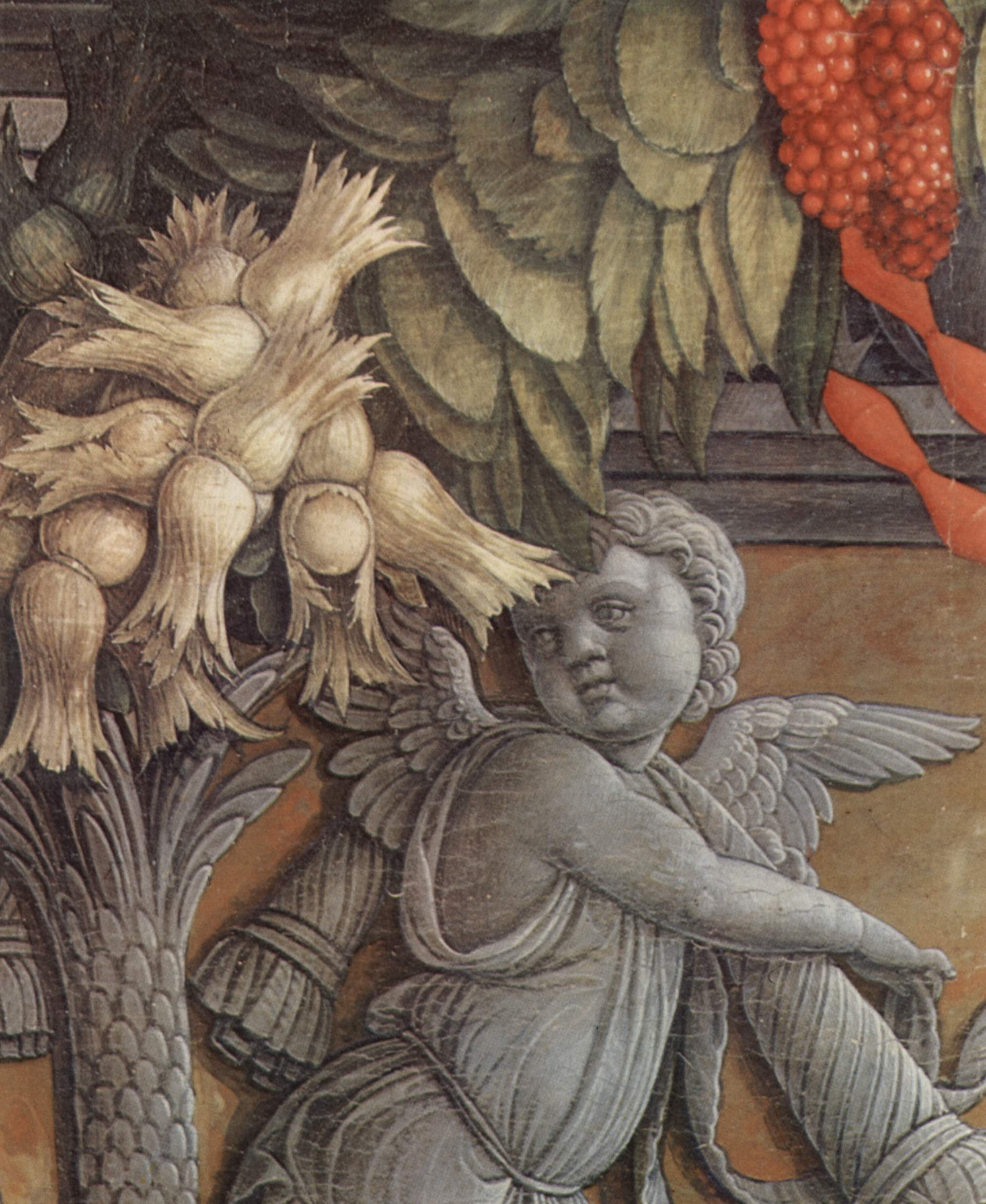 detail